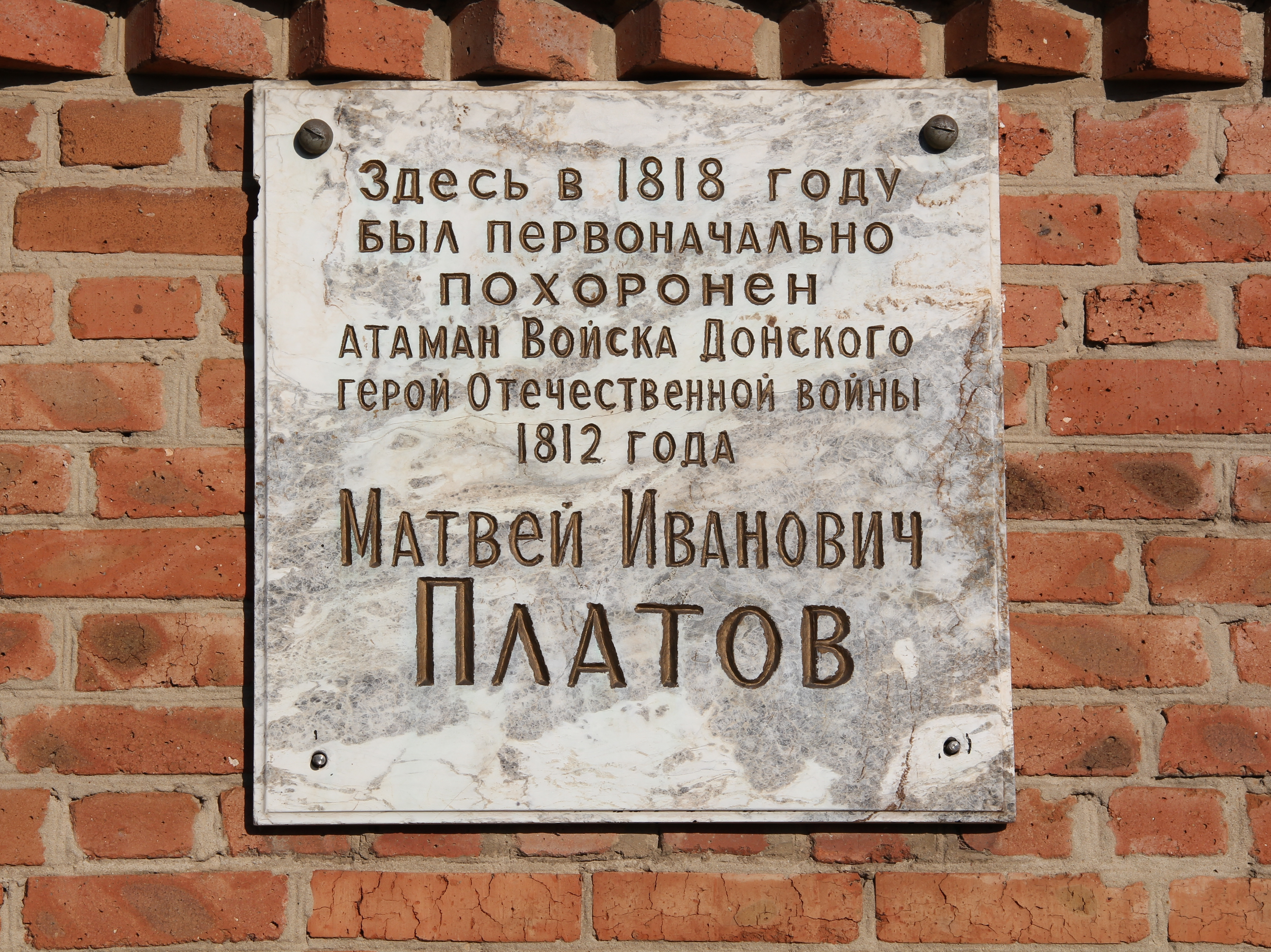 Мемориальная доска на месте первоначального захоронения М.И.Платова в хуторе Малый Мишкин.